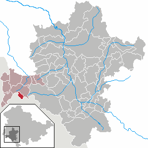 Melpers in Thuringia - District Schmalkalden-Meiningen